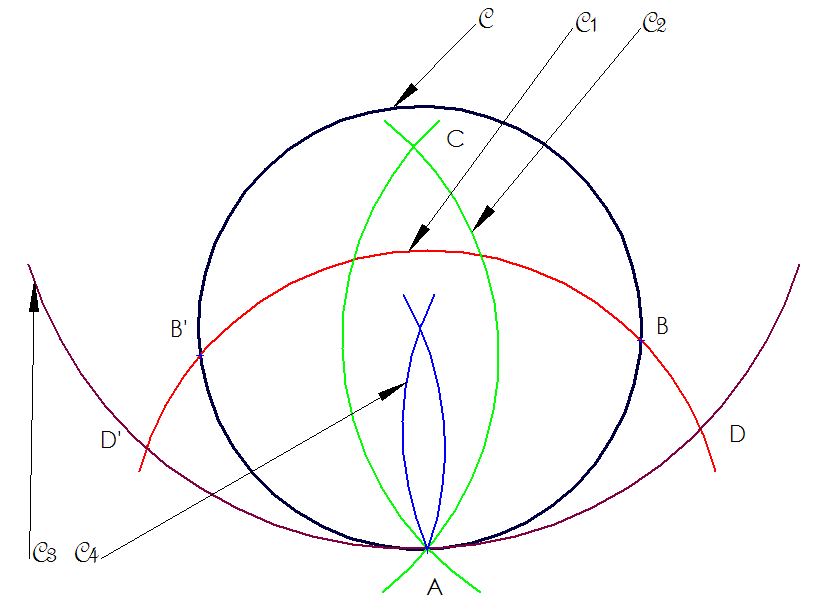 Résolution du problème de Napoléon: Comment trouver le centre d'un cercle par une construction exclusive au compas. Epure réalisée sous solidworks. Détail de la construction soit le cercle C dont on veut déterminer le centre. Soit un point A de C. Un cercle C1 centré en A rencontre C en B et B'. Deux cercles C2 centrés en B et B' et passant par A se rencontrent au point C. Un cercle C3 centré sur C et passant par A rencontre C1 en D et D' Deux cercles C4 centrés en D et D' se rencontrent au centre de C. Remarque en donnant au cercle C un rayon égale à 1, et à C1 un rayon r dans l'intervalle [1/2;2]. Alors la distance AC vaut r². Catégorie:géométrie Catégorie:Cercle et sphère